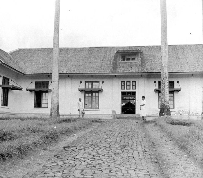 Negatief. Ziekenhuis te Semblimbingan, Borneo